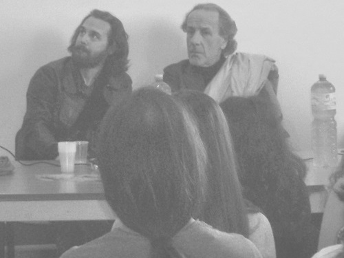 ECucchi